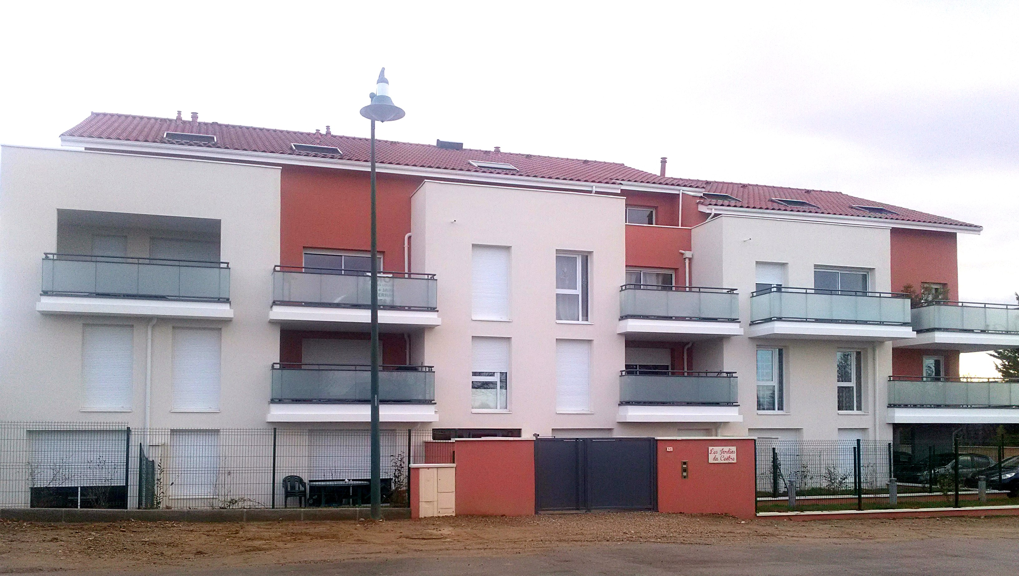 Bâtiment route du Valeron